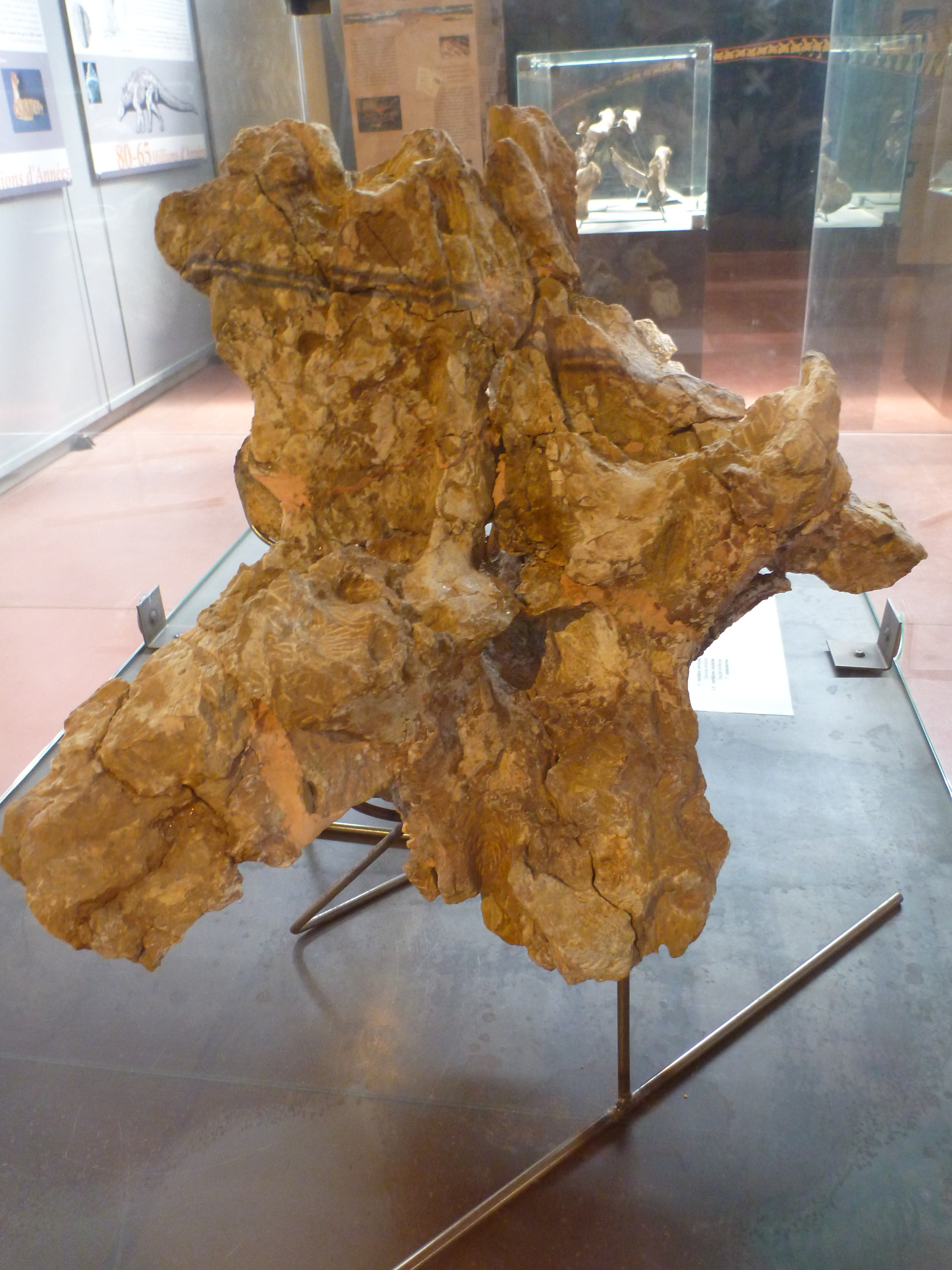 Dorsal vertebra of Ampelosaurus, on display at the Musée des dinosaures, Esperaza, France